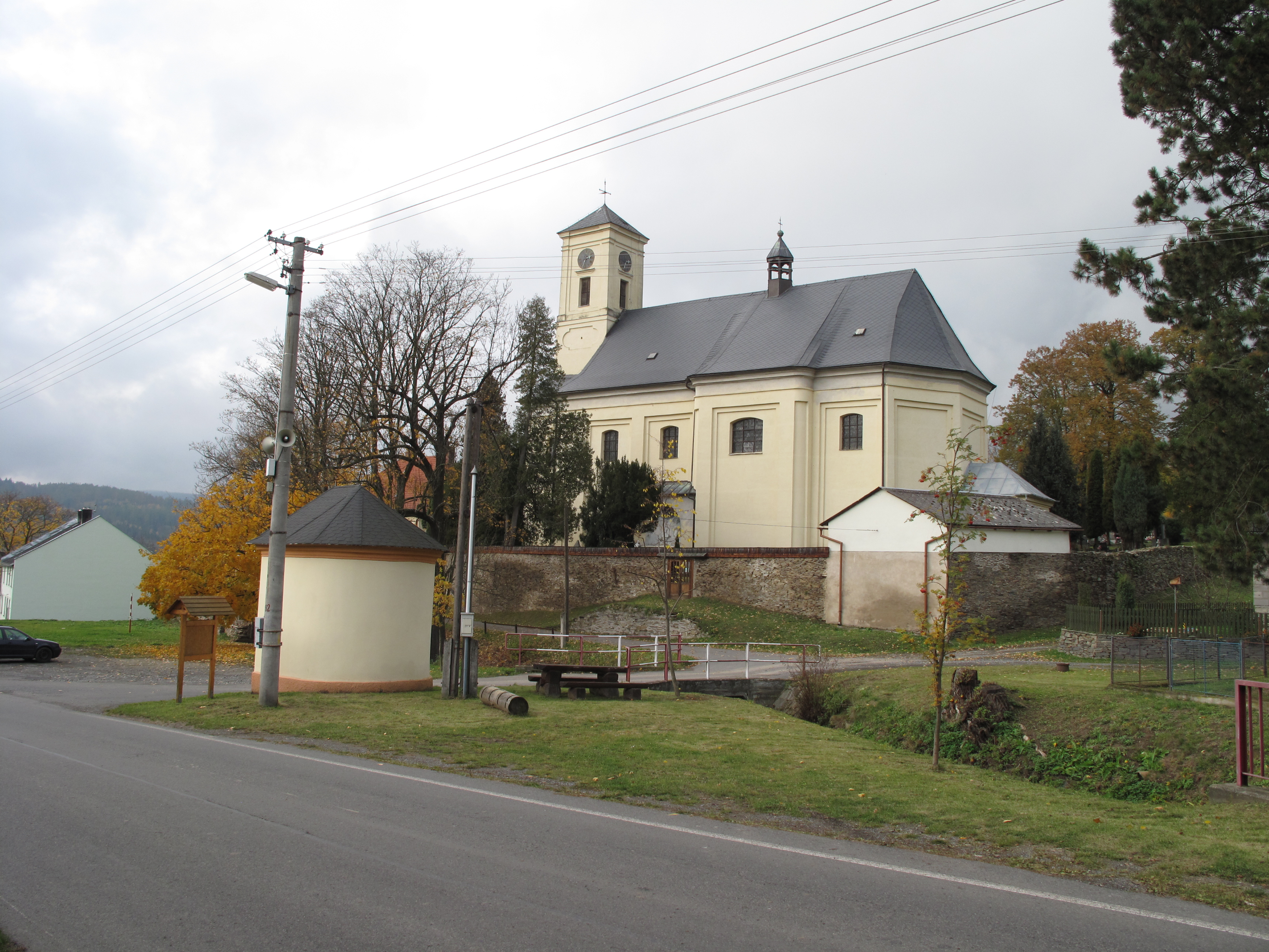 Široká Niva. Okres Bruntál, Česká republika.